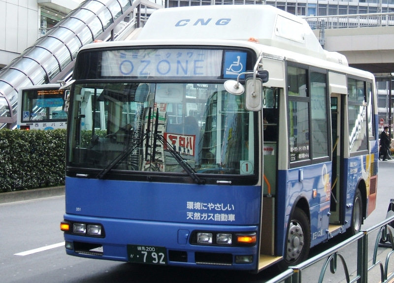 Shinjuku Park Tower shuttle bus.